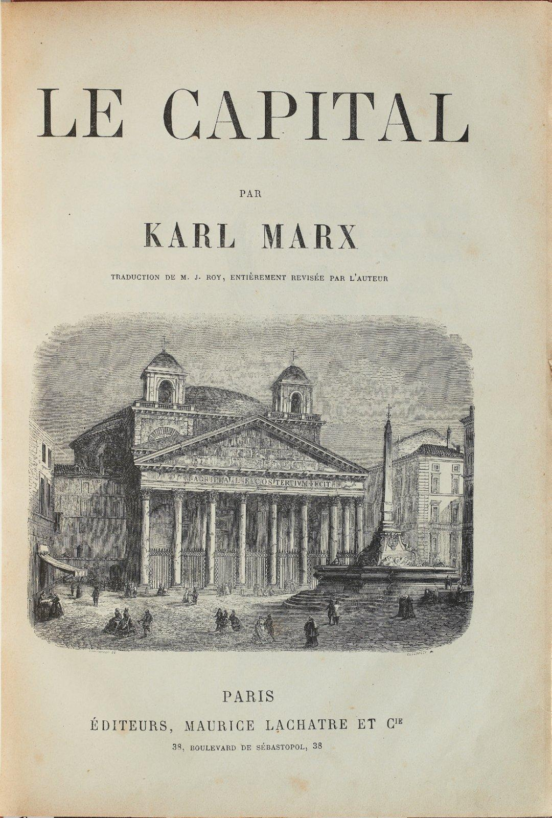 Cover